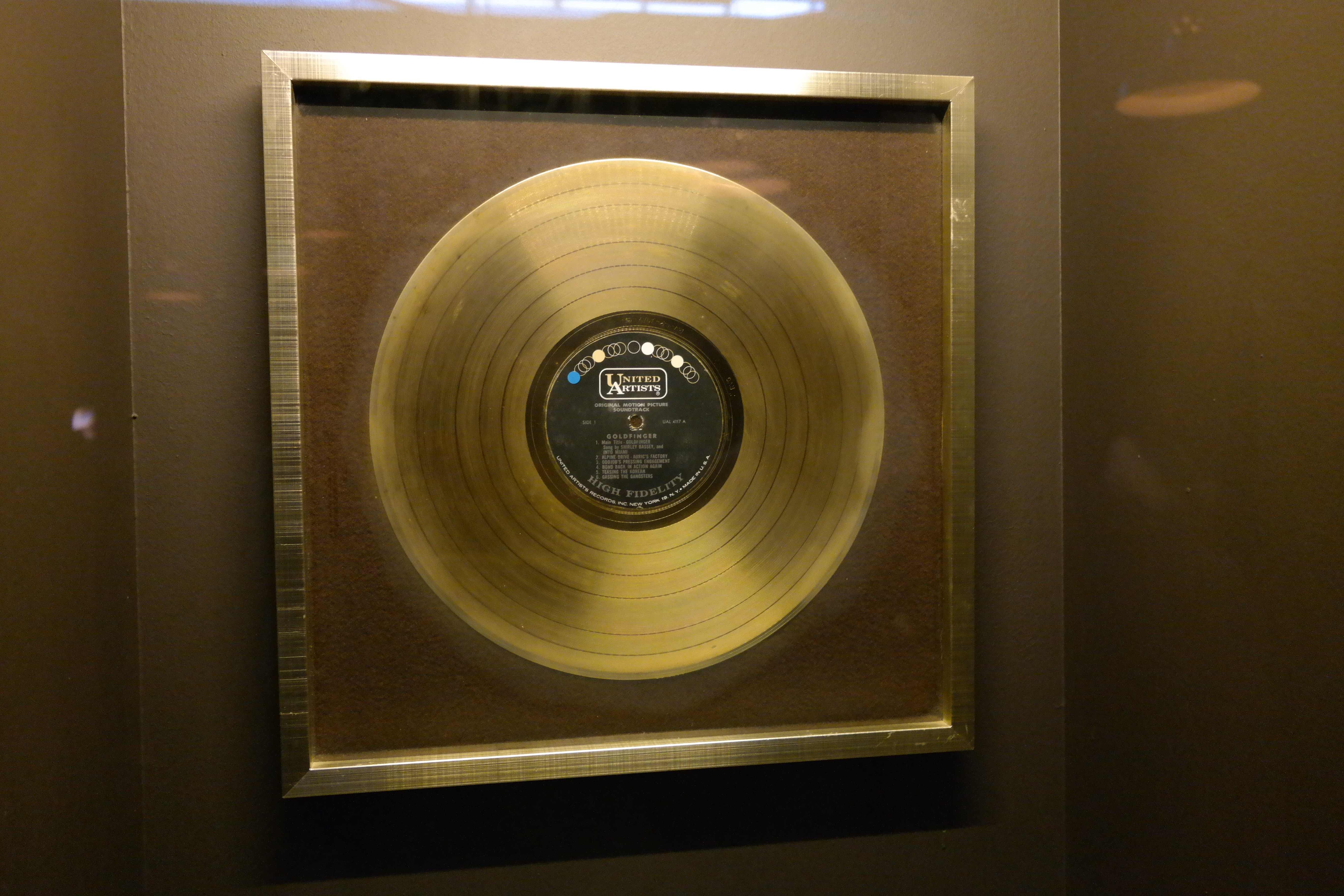 Een gouden versie van het album Goldfinger, persoonlijk eigendom van Shirley Bassey, gefotografeerd in de Kunsthal in Rotterdam tijdens de tentoonstelling Designing 007: Fifty Years of Bond Style.